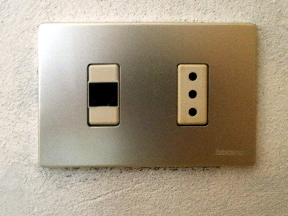 Moderna installazione BTicino Magic che comprende un connettore telefonico a quattro contatti (art. 5982) e una presa CEI 25-50 P 11